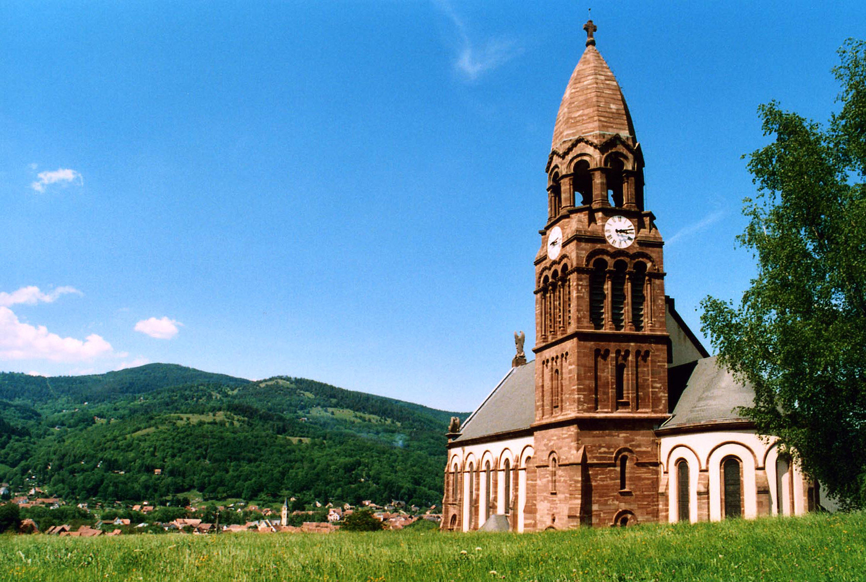 L'Église de l'Emm (Metzeral-Sondernach). Photo : Samuel Wernain (2005).